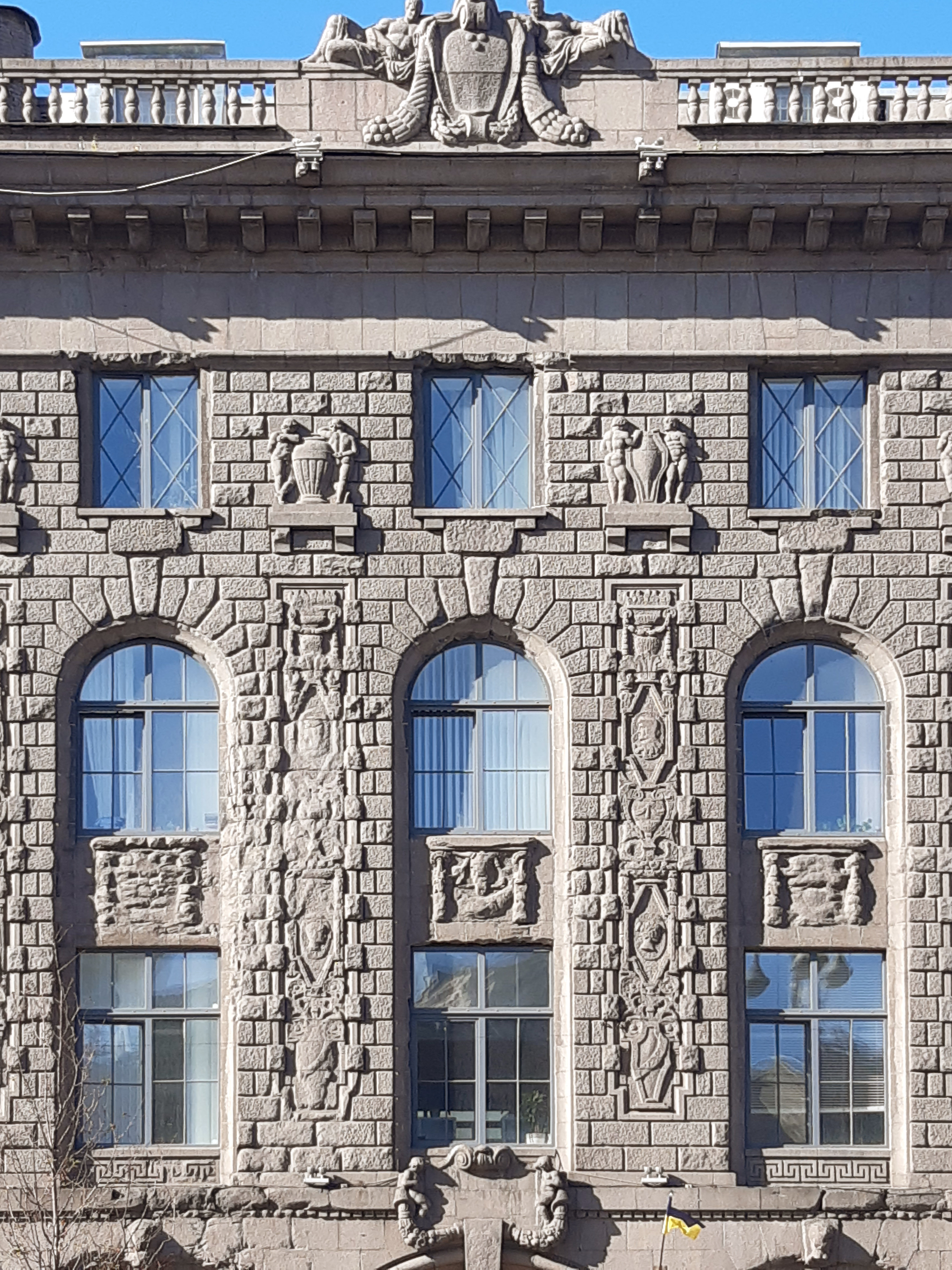 Фасад. Російський банк для зовнішньої торгівлі, Київ, вул. Хрещатик, 32